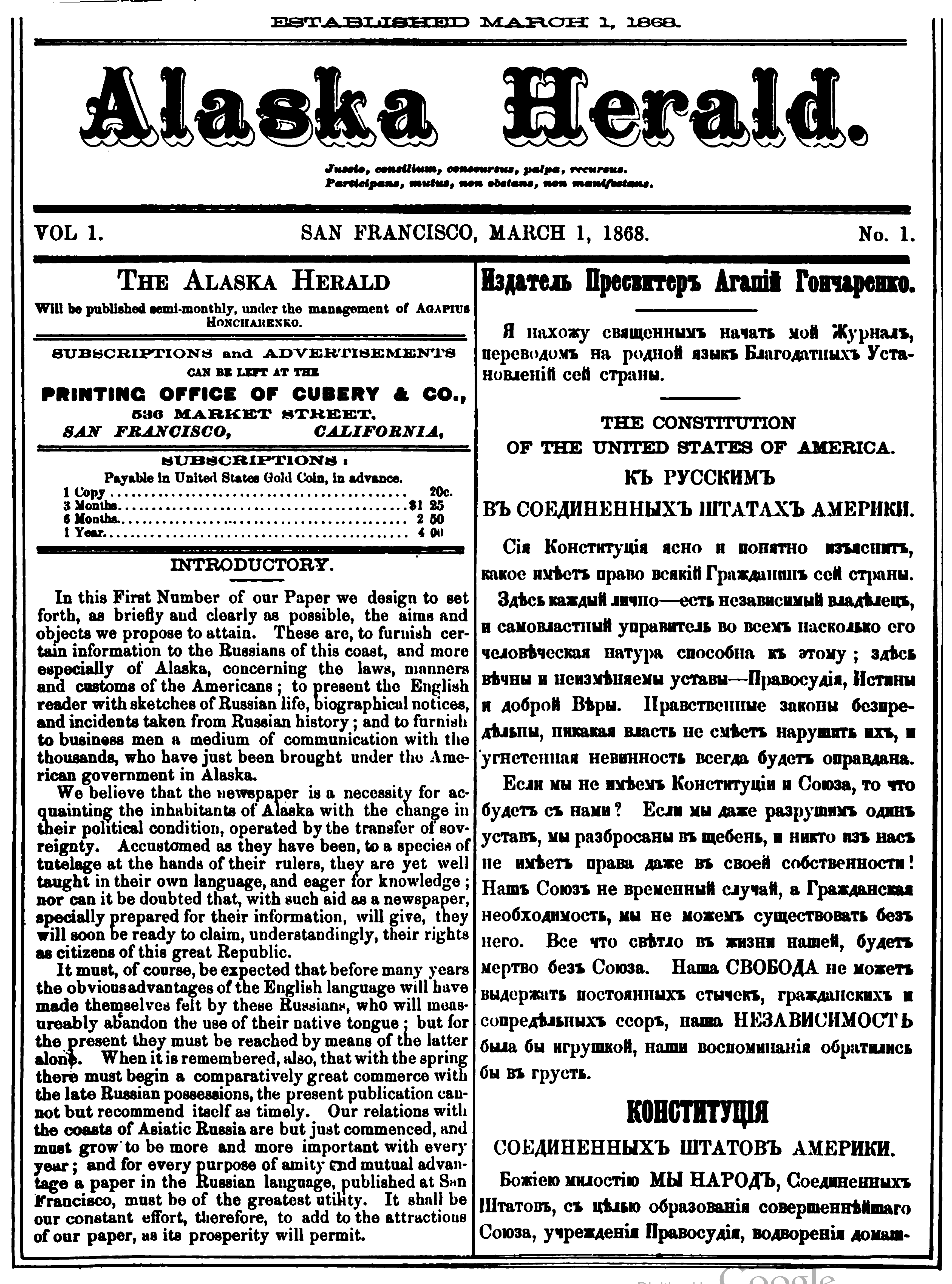 Первый выпуск Вестника Аляски